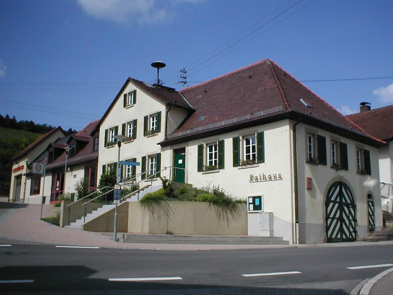 Rathaus in Östringen-Eichelberg. Neueres Gebäude auf Fundamenten von 1604.